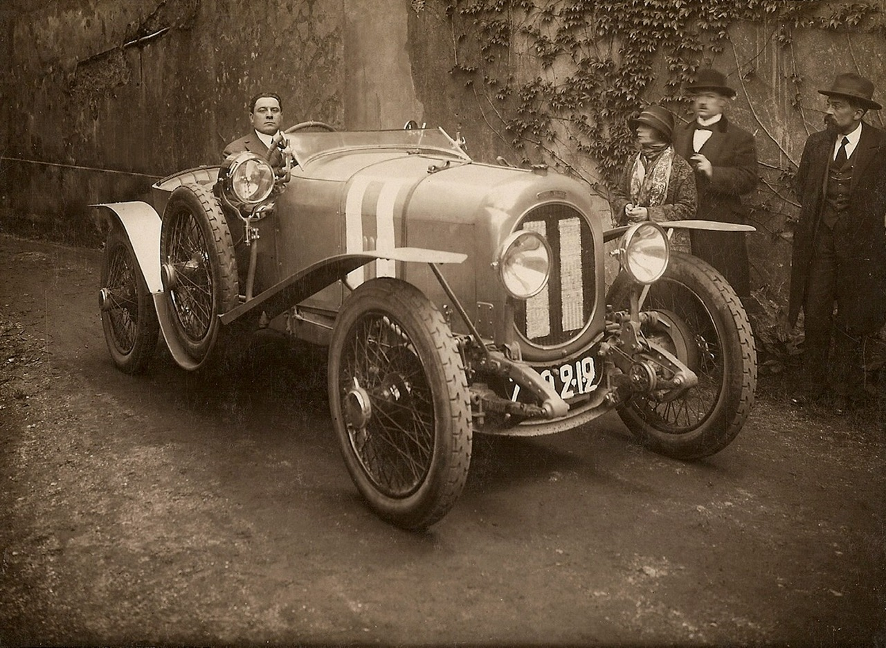 Fernand Bachmann Chenard & Walcker No11 des 24h du Mans 1923